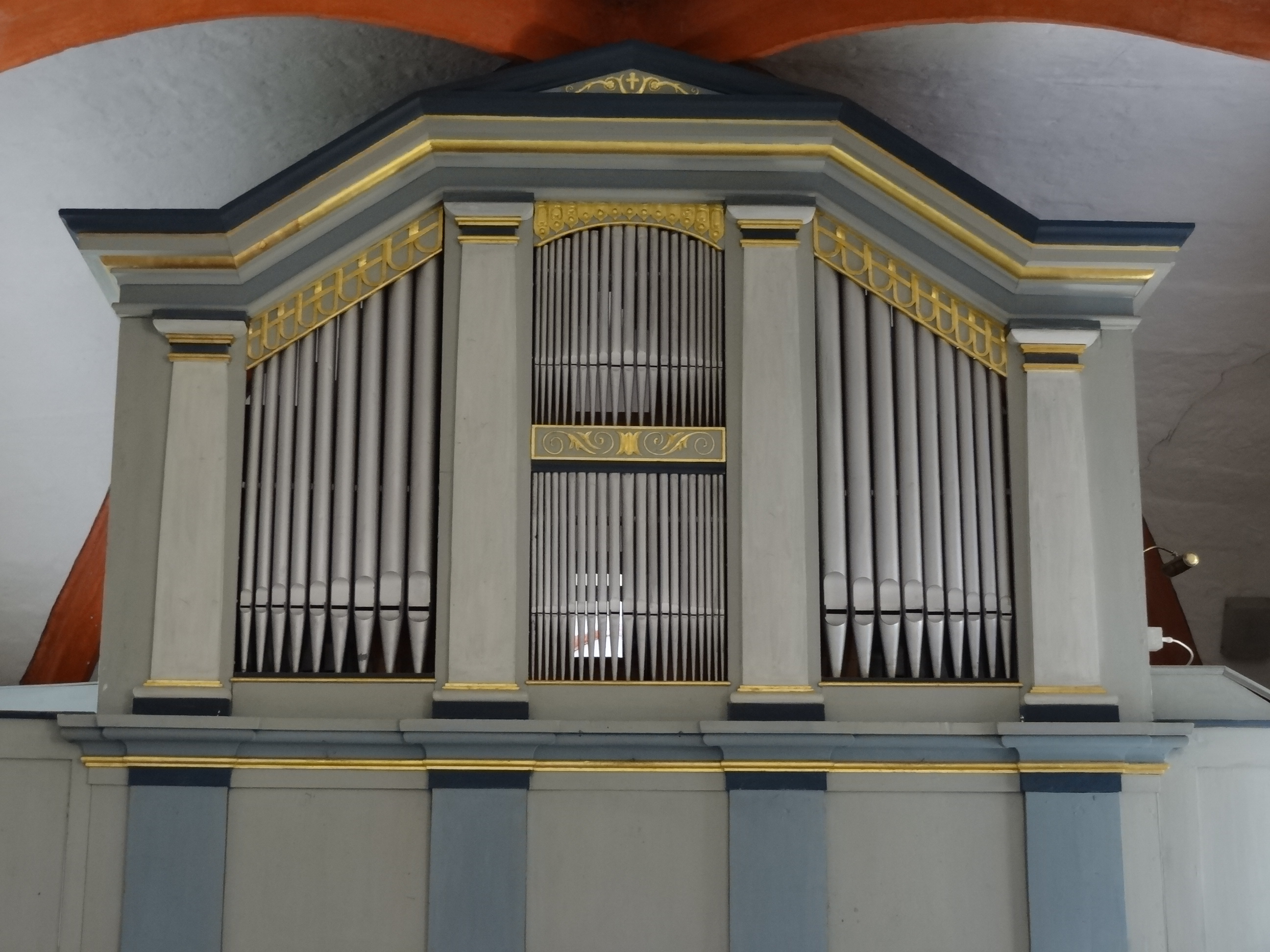 Evangelische Kirche Obbornhofen